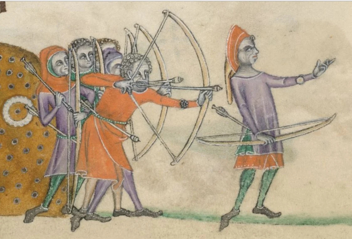 Entrainement des archers gallois: Psalm 79; archery practice